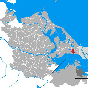 Zirchow, Landkreis Ostvorpommern, Mecklenburg-Vorpommern